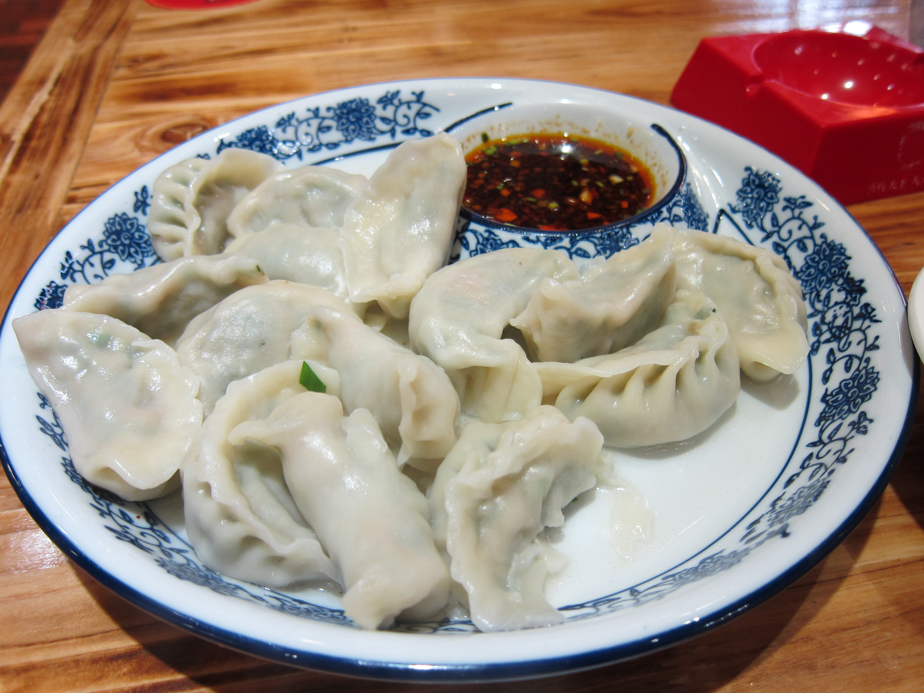 餃子がすごい凉出てきて慌てた。